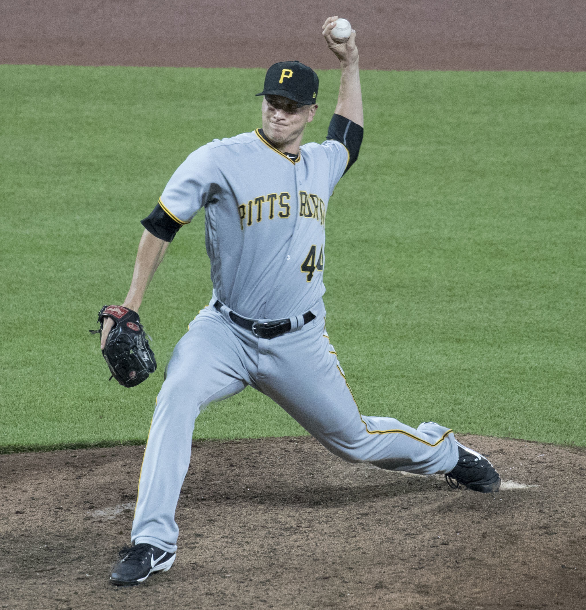 Pirates at Orioles 6/7/17